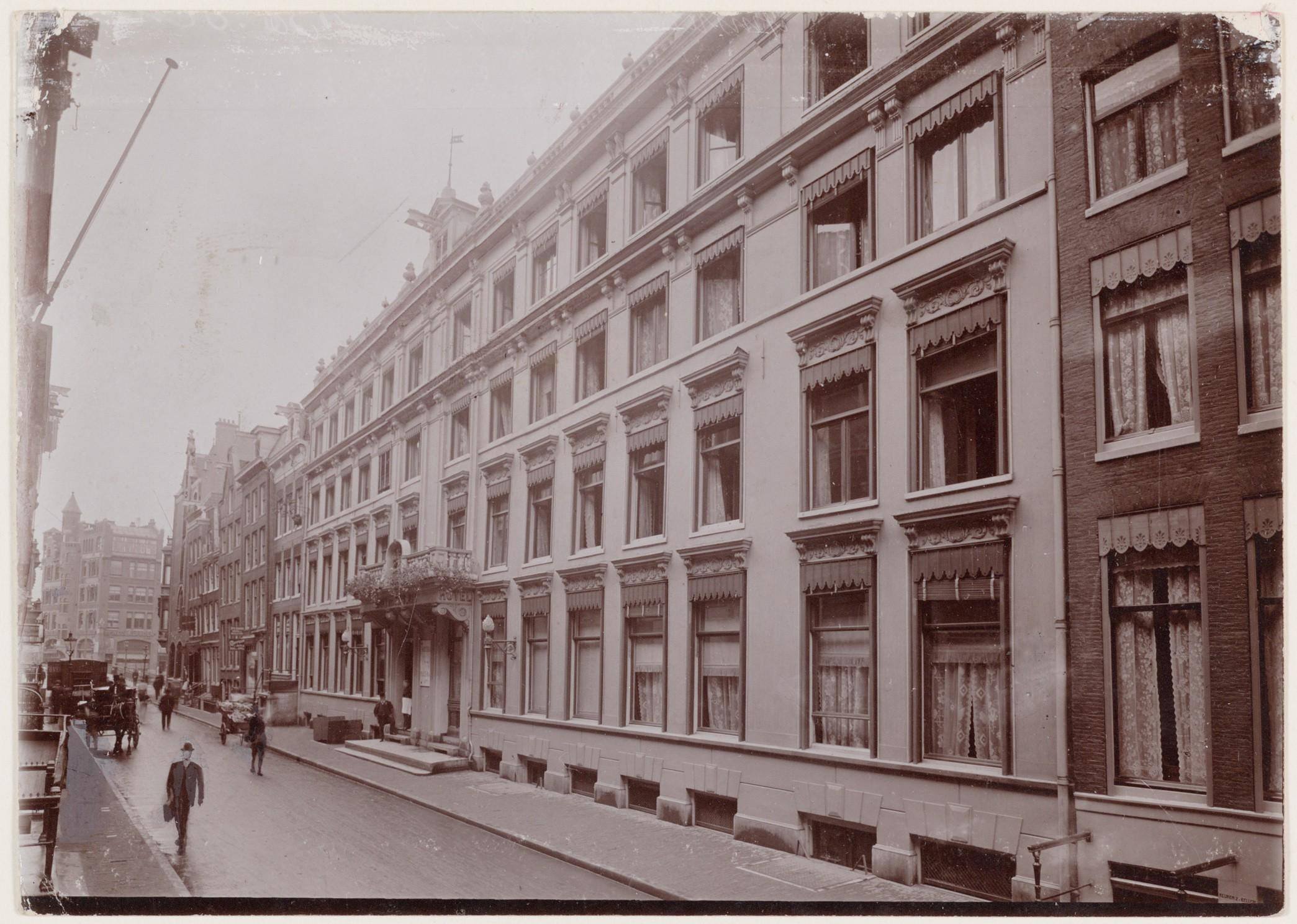 Beschrijving Nieuwe Doelenstraat 11 Gezien naar Muntplein. Hotel des Pays-Bas Documenttype foto Vervaardiger Boek-, kantoor- en papierhandel J. Vlieger Collectie Collectie Stadsarchief Amsterdam: foto-afdrukken Geografische naam Muntplein Nieuwe Doelenstraat Gebouw Munttoren Inventarissen Afbeeldingsbestand OSIM00002002196 Generated with Dememorixer